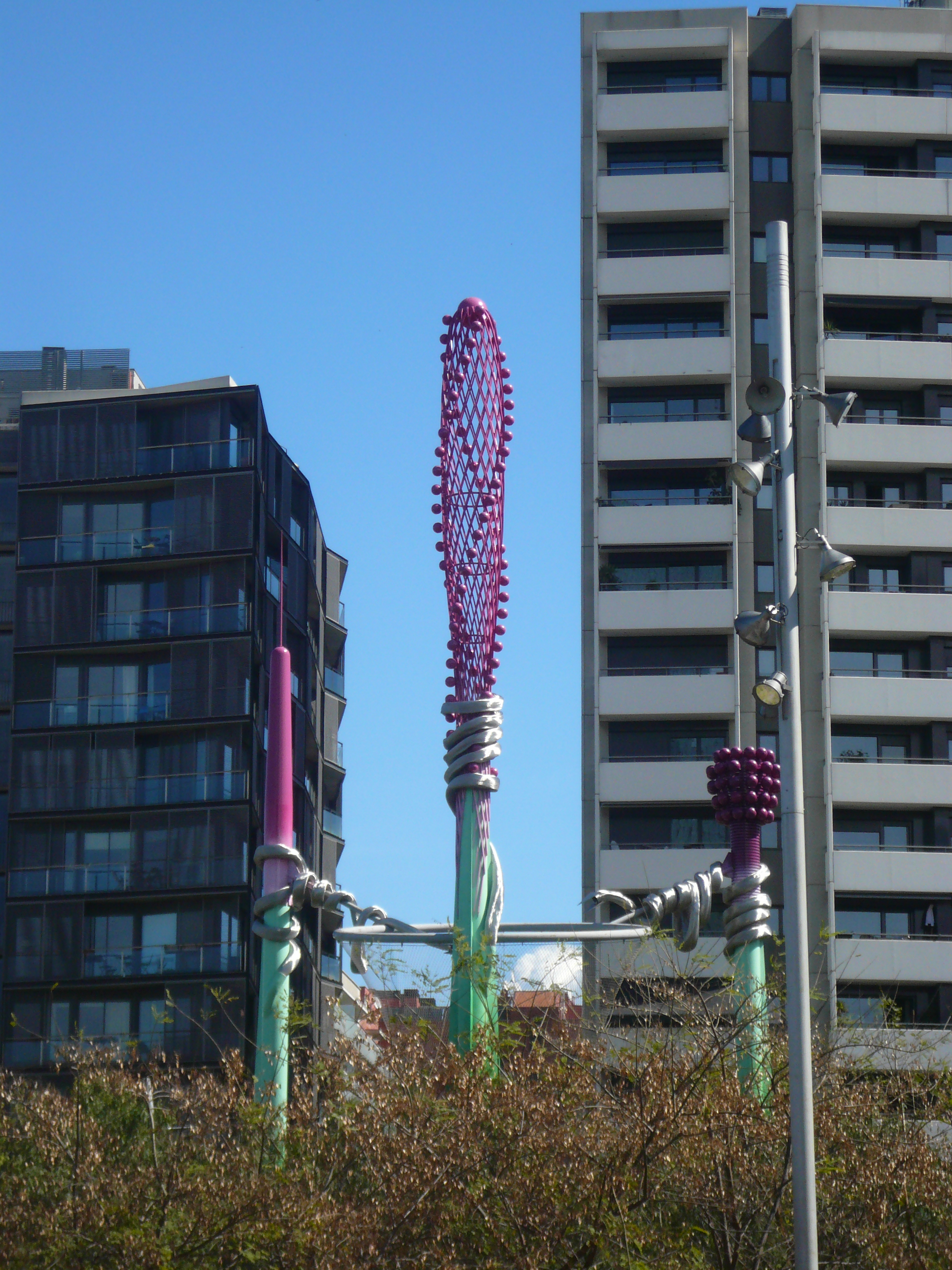 Escultura del Parc Central del Poblenou vista des de la Diagonal